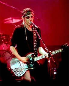 Guitarrista